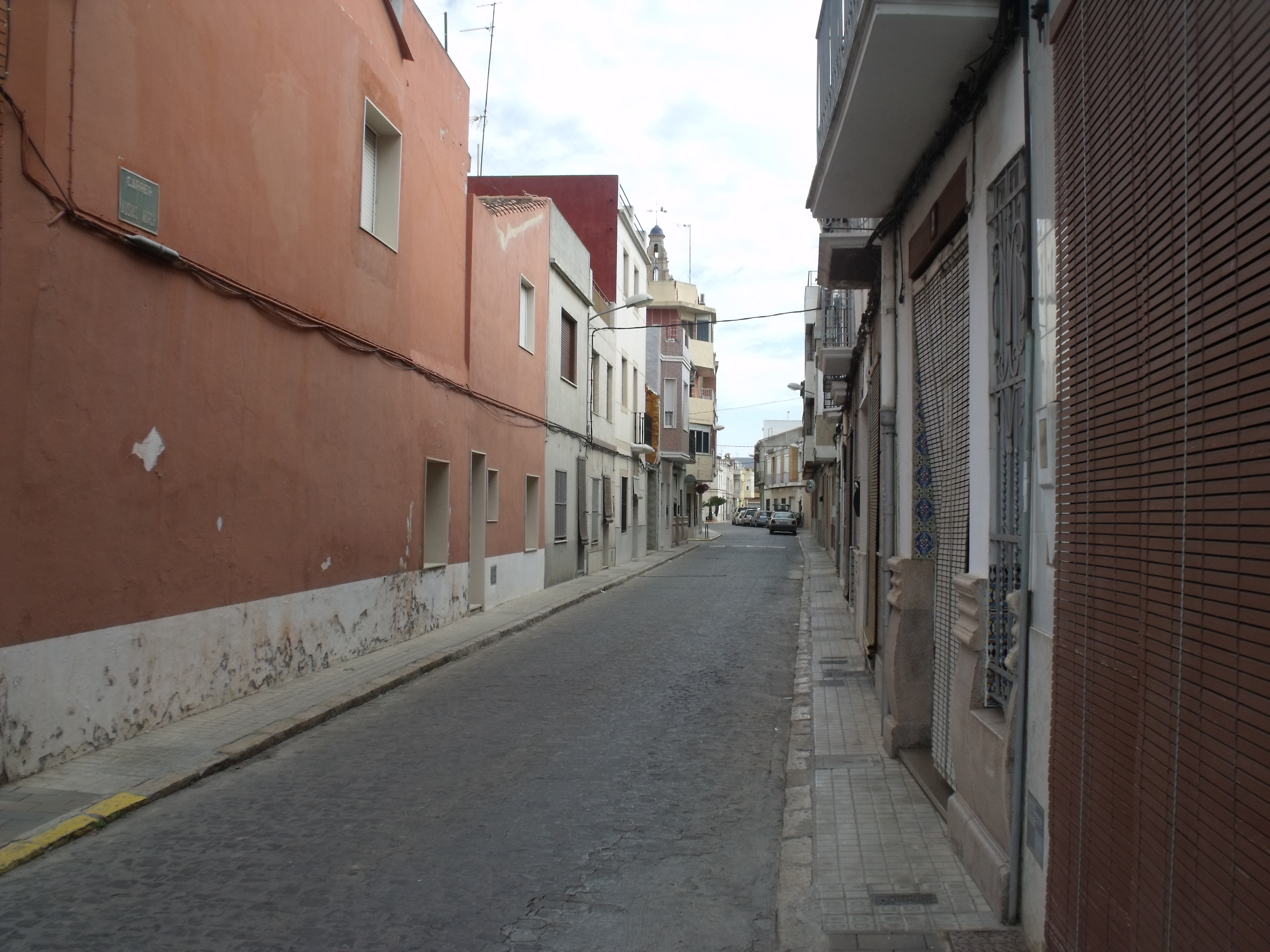 calle de Riola